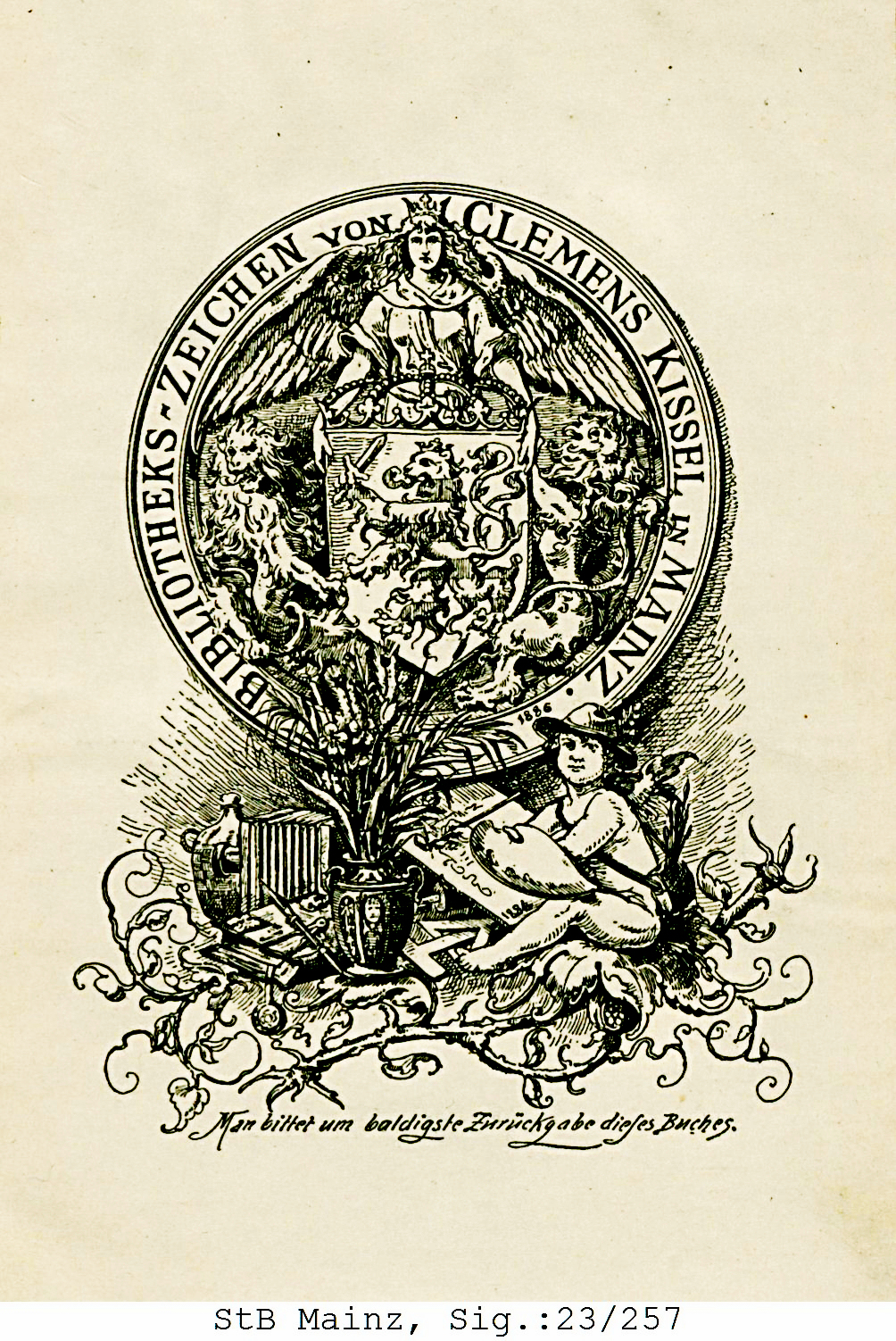 Exlibris des Künstlers Clemens Kissel aus dem Buch "Zunft-Wappen und Handwerker-Insignien : eine Heraldik der Künste und Gewerbe ; nach urkundlichem Materiale" / zsgest. von Alfred Grenser. Frankfurt am Main : Rommer, 1889. Clemens Kittel ist zugleich Künstler des Exlibris. Signatur in der Wissenschaftlichen Stadtbibliothek: 23 / 257 Clemens Kissel Beruf: Schriftsteller und Graveur Lebensdaten: 03.05.1849 - 25.12.1911 Geburts- und Sterbeort: Mainz